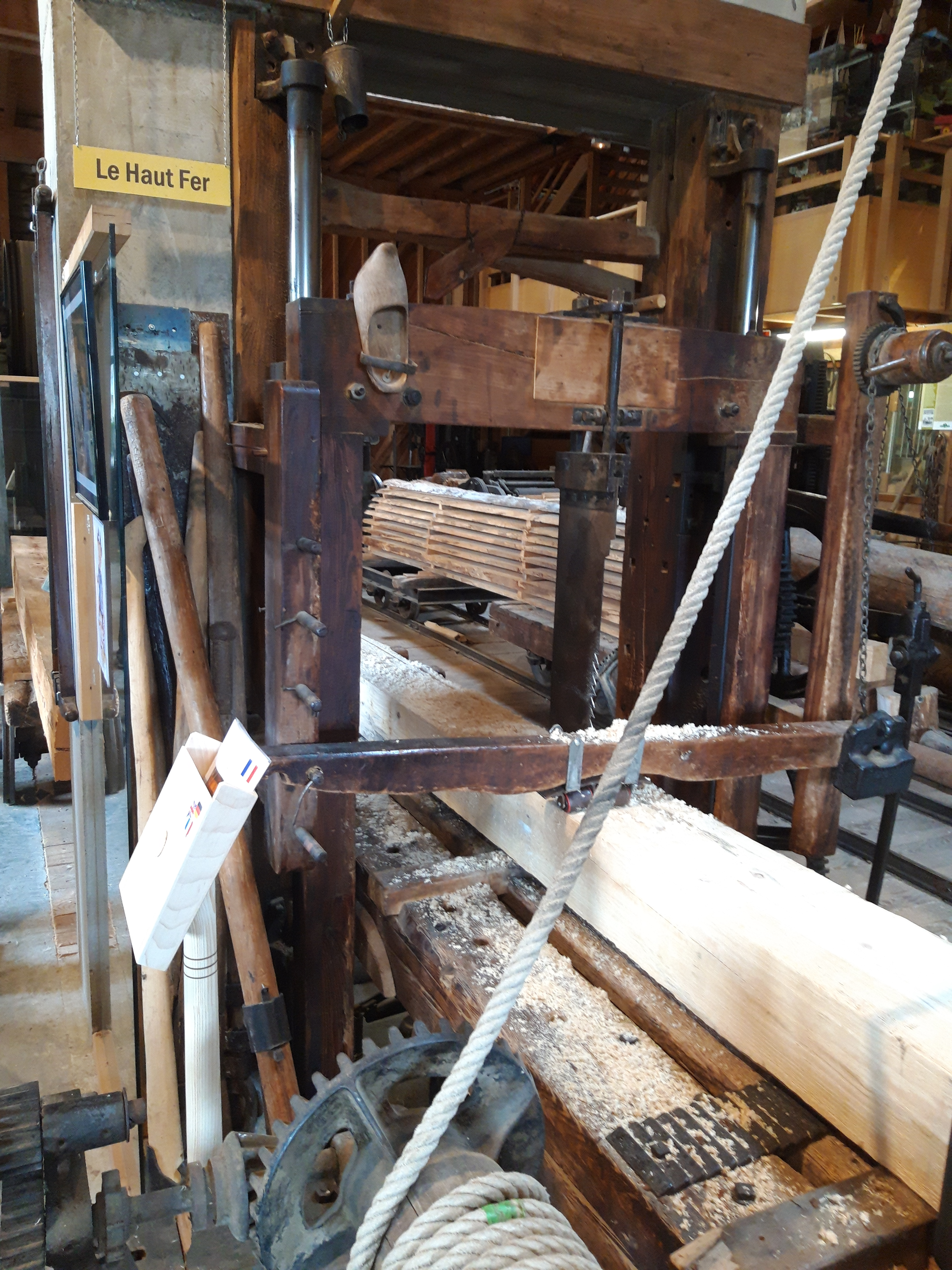 Haut fer servant à débiter des troncs d'arbres, musée des métiers du bois, Labaroche (Haut-Rhin)